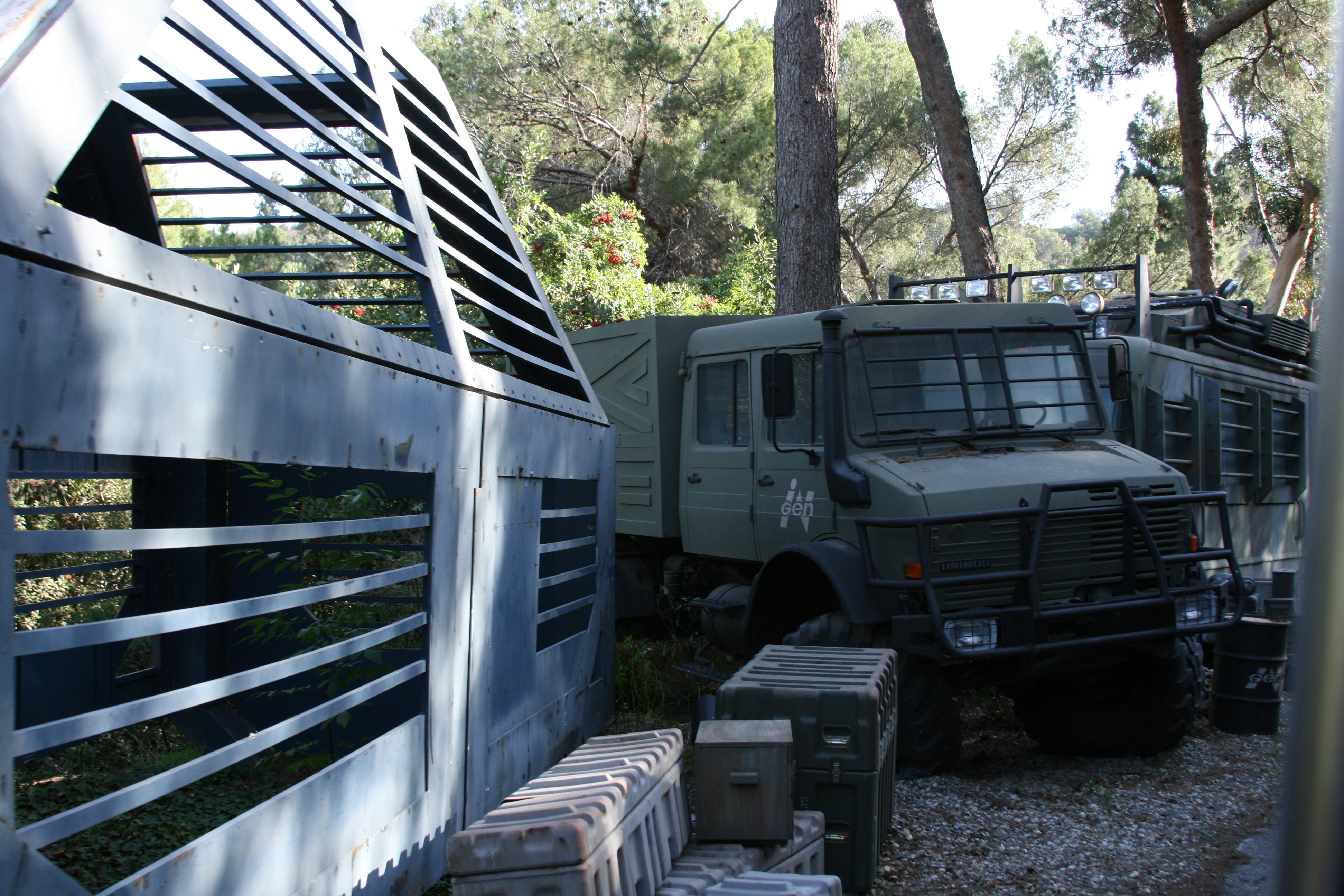 Véhicules utilisés dans le film Jurassic Park : The Lost World